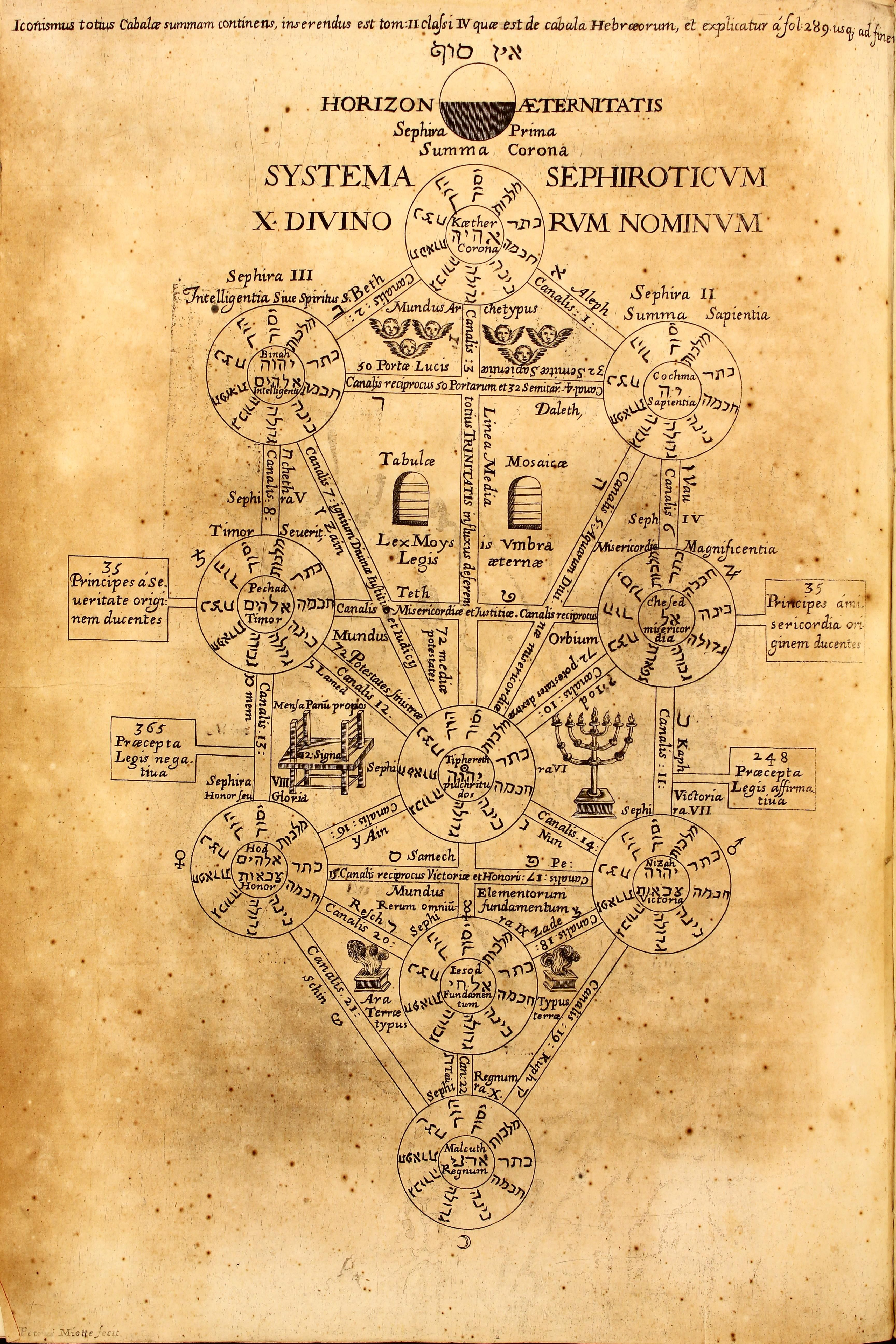 Autor: Kircher, Athanasius, (S.I.), 1602-1680 Descripción bibliográfica: Athanasii Kircheri e Soc. Iesu, Oedipus Aegyptiacus : hoc est Vniuersalis hieroglyphicae veterum doctrinae temporum iniuria abolitae instauratio : opus ex omni orientalium doctrina & sapientia conditum, nec non viginti diuersarium linguarum, authoritate stabilitum, felicibus auspiciis Ferdinandi III, Austriaci sapientissimi & inuictissimi Romanorum imperatoris semper Augusti è tenebris erutum, atque bono reipublicae literariae consecratum. Tomus primus . - Romae : Ex typographia Vitalis Mascardi, 1652 . - [96], 424, [39] p., [1] en bl., [1] h. de grab., [2] mapas pleg. : il. ; Fol. Materia: Egipto - Escritura jeroglífica Notas: Sign.: 2, 2[cruz]-9[cruz]4, a-c4, d2, A-3M4 . - Texto con apostillas marginales . - Inic. grab. Impresor: Mascardi, Vitale Lugar de impresión: Italia. Roma Localización: Vea la ilustración en su contexto Libro completo en pdf